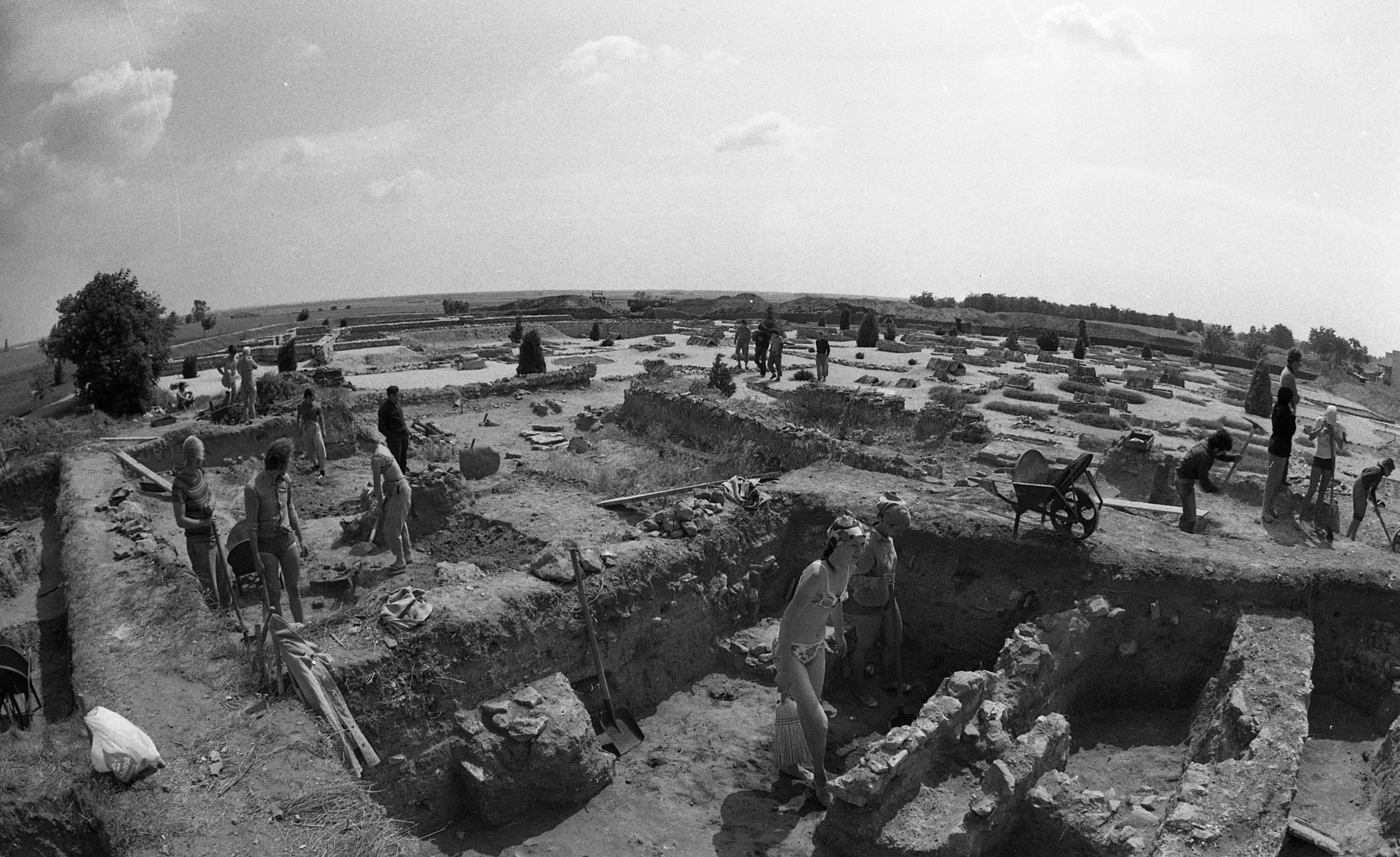 a római kori Gorsium feltárása. Location: Hungary, Tác Tags: excavation Title: a római kori Gorsium feltárása.